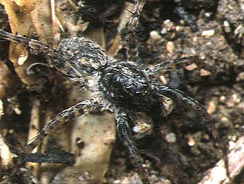 male Wadicosa okinawensis from Okinawa.